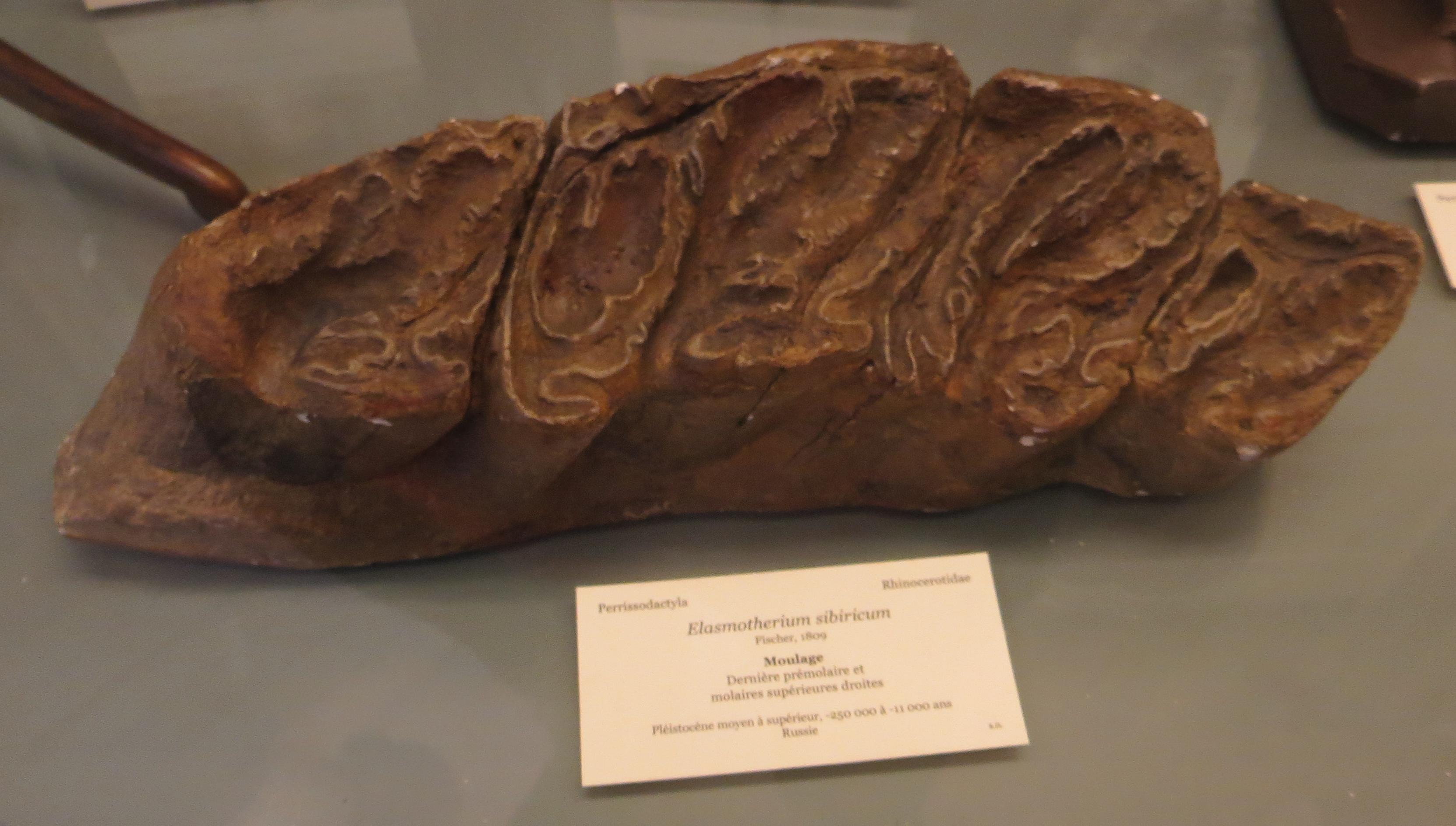 Elasmotherium sibiricum fossil teeth